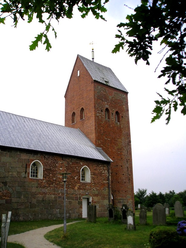 St. Laurentii in Süderende, Föhr